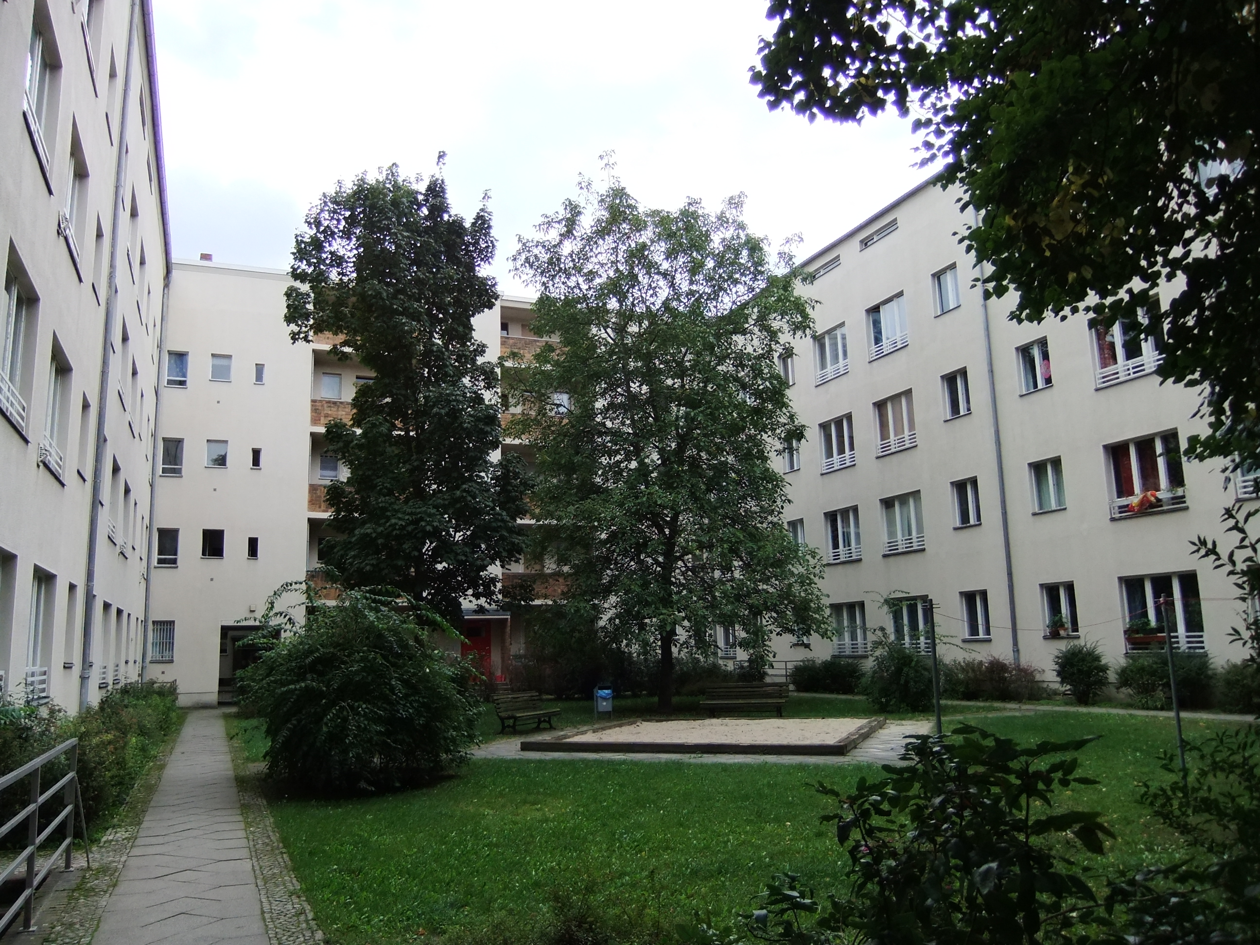 Denkmalliste Berlin 09040194 - Berlin Rummelsburg Friedastraße 9-15, Wohnanlage, 1930-33 von Adolf Rading Irenenstraße 8-13 Metastraße 19/21